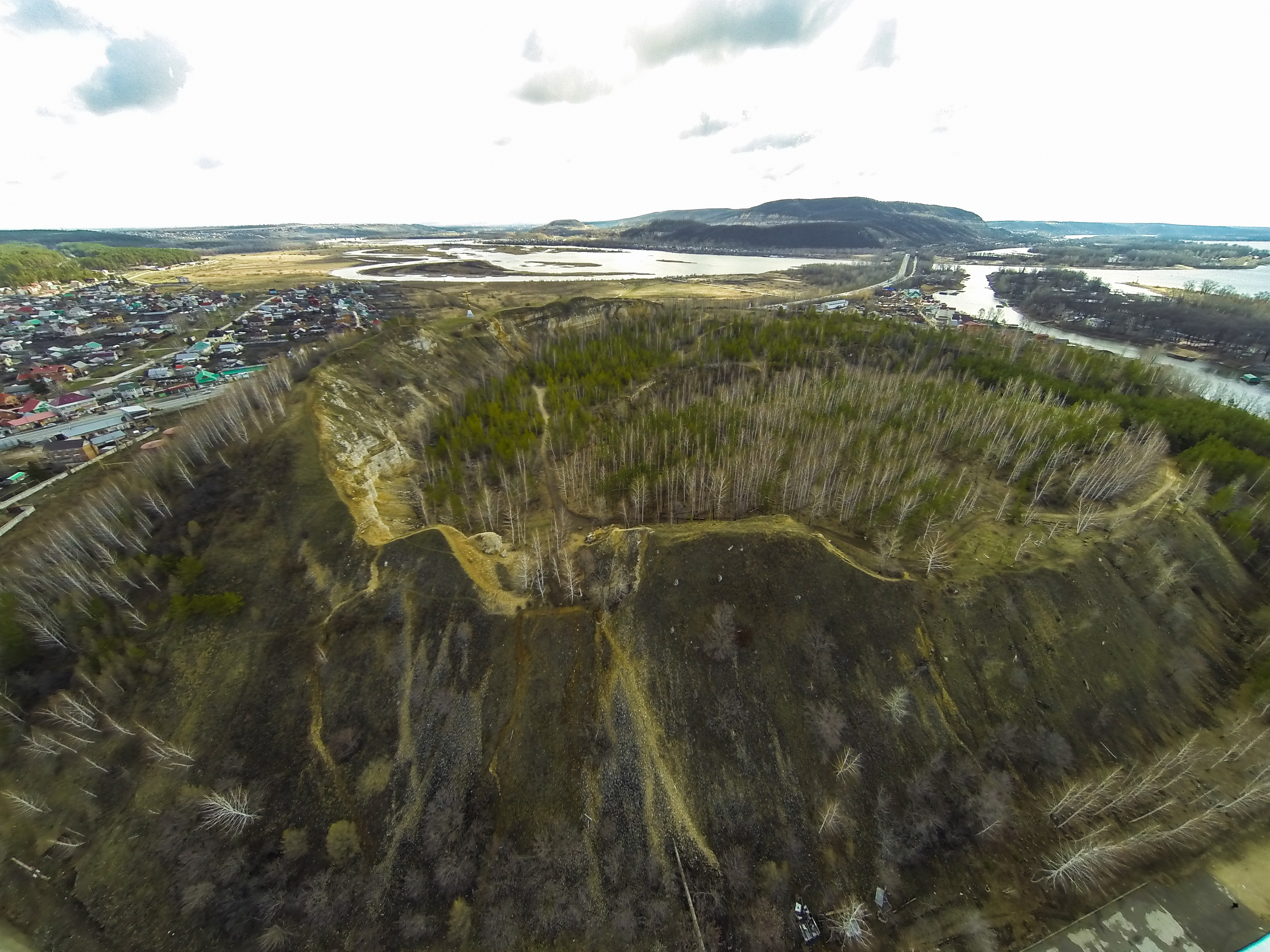 Царев курган, Красноярский район This image is related to the protected area of Russia number 6310440